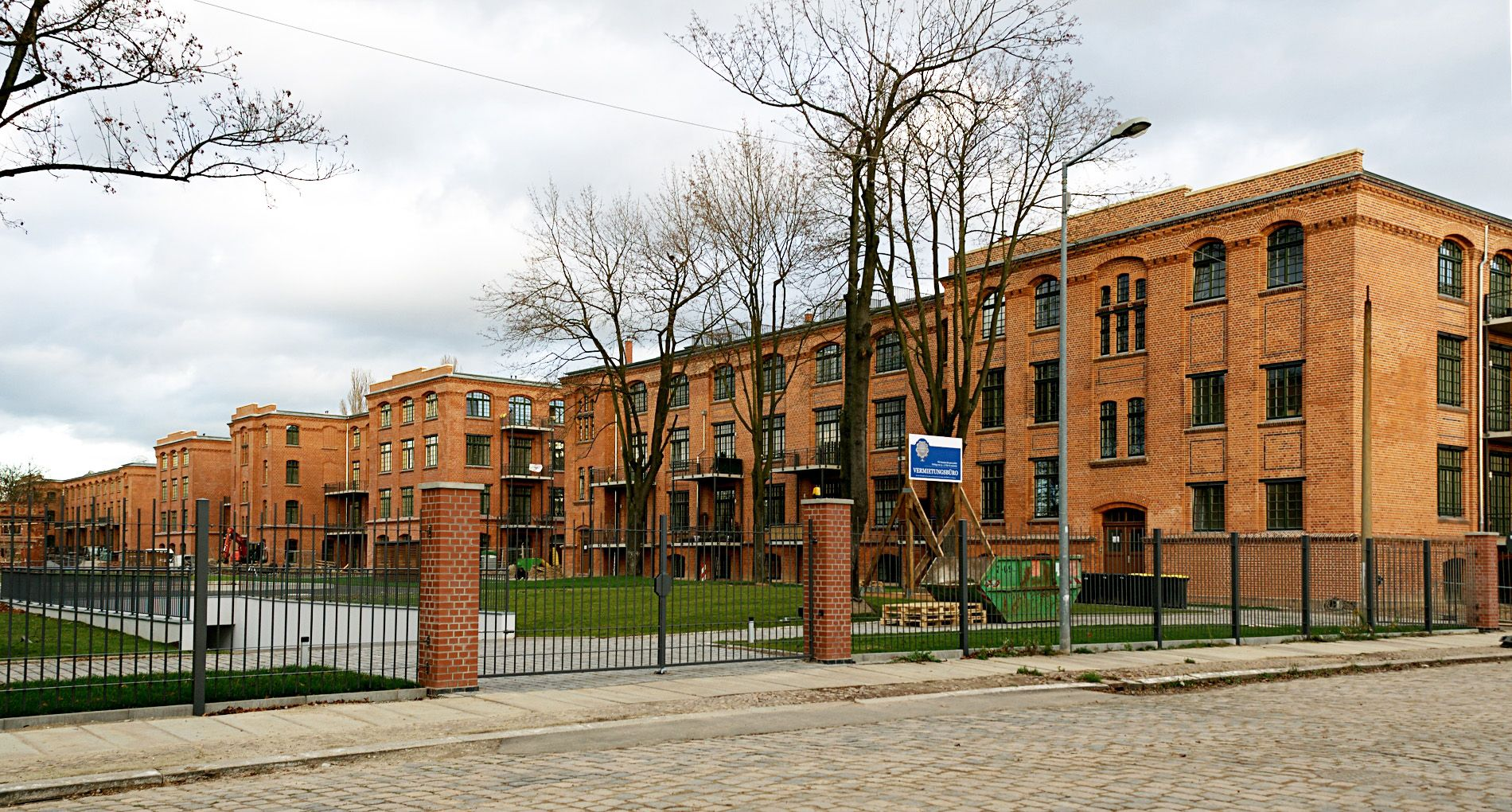 Ehemalige Kaserne (ehem. Bekleidungsamt) in Leipzig Gohlis (Gelände Olbrichtstraße/Viertelsweg ehem. Heer-/Planitz-Straße, Stand 1913) - erbaut ab 1895.